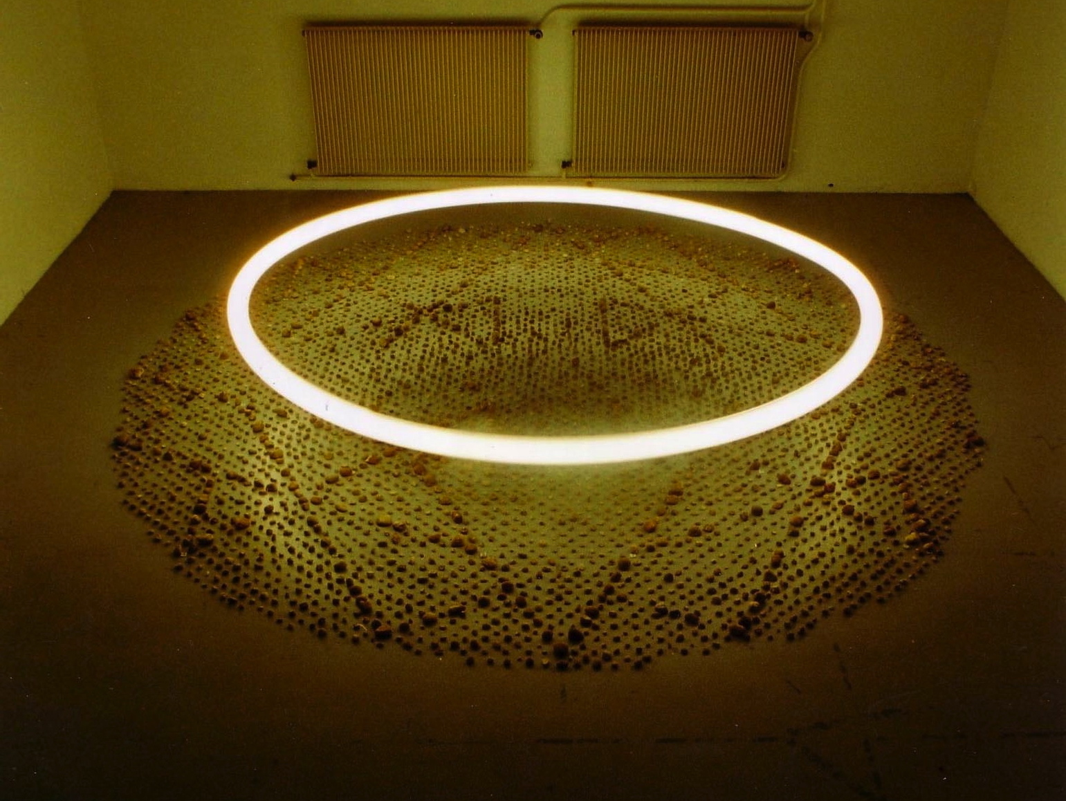 Chambre à tracer Galets, moteur, lumière 2002